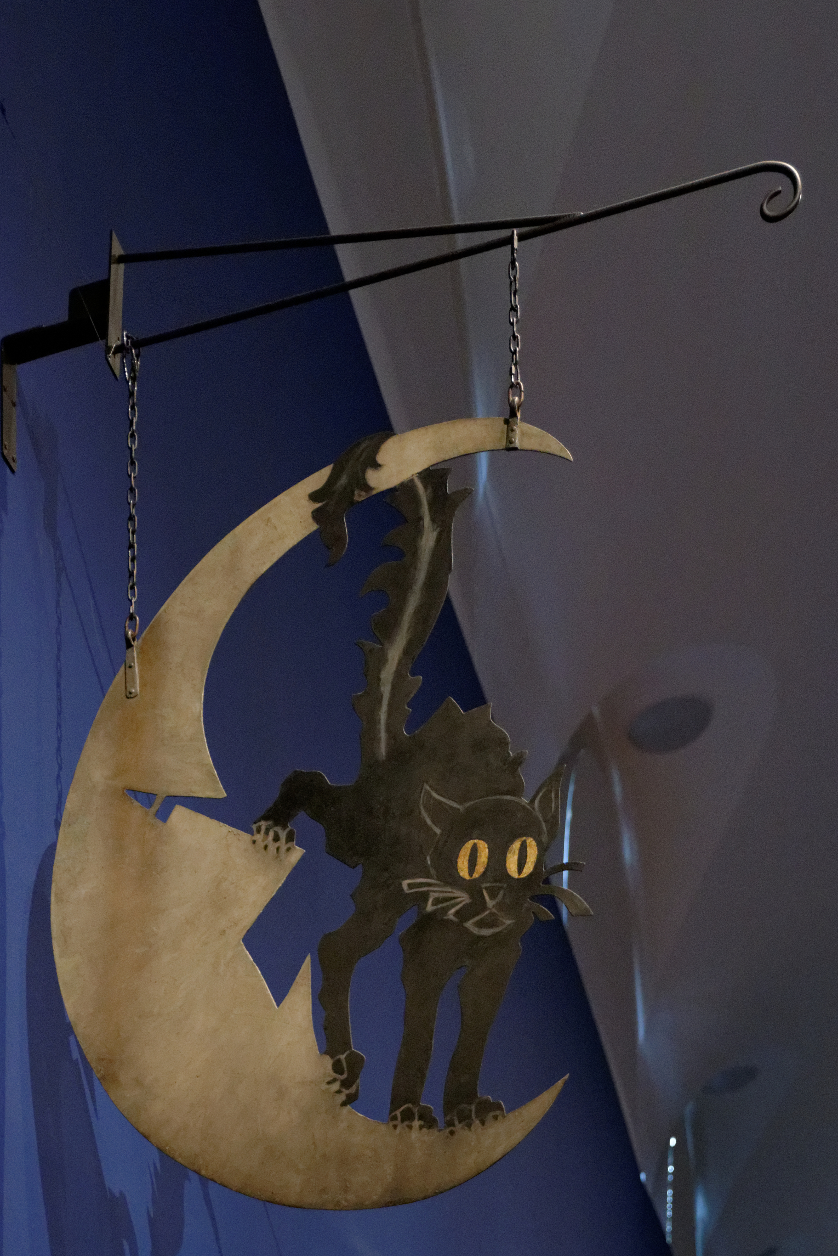 Le chat noir, exposition Paris 1900, la Ville spectacle au Petit Palais.